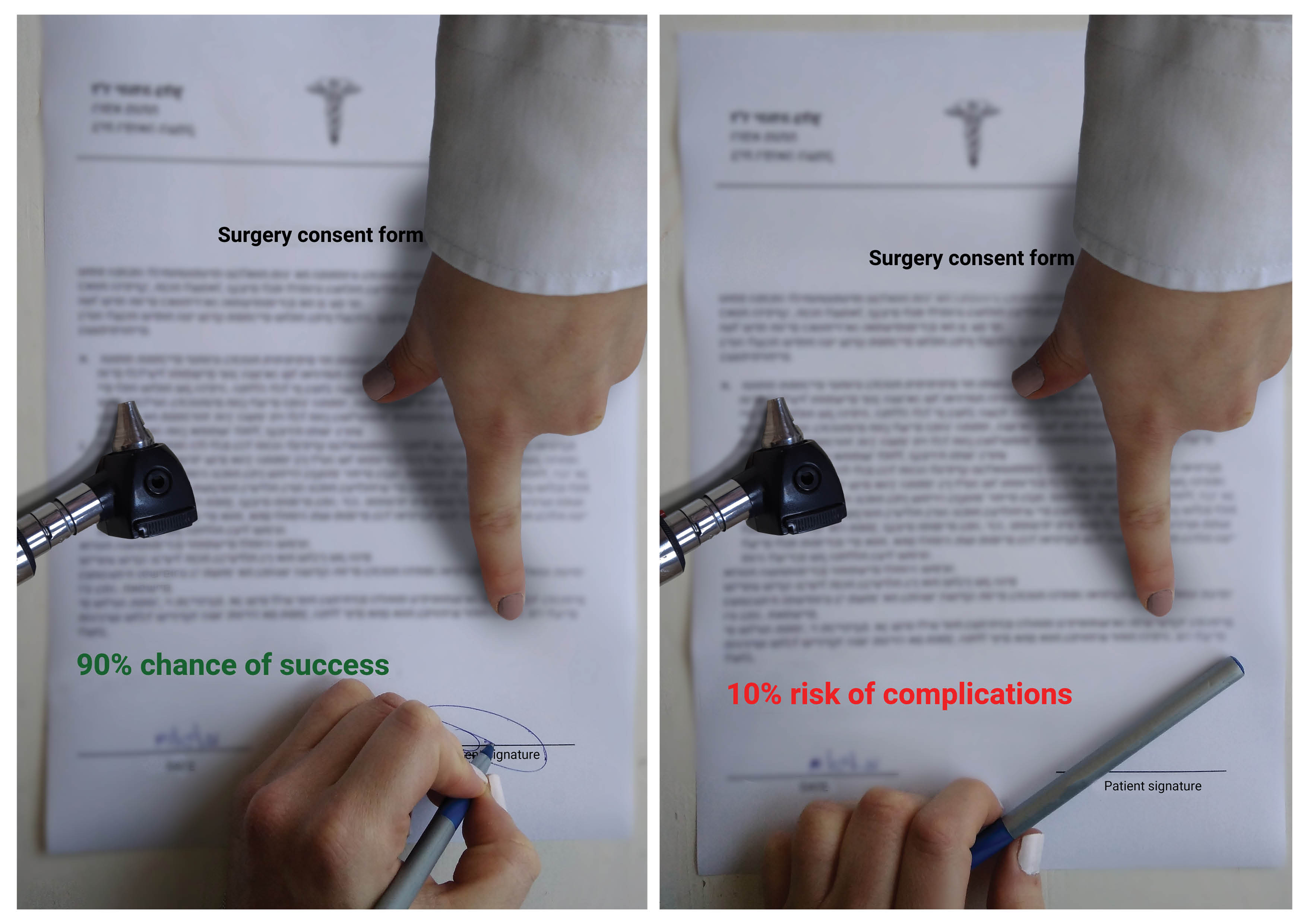 Framing effect illustration